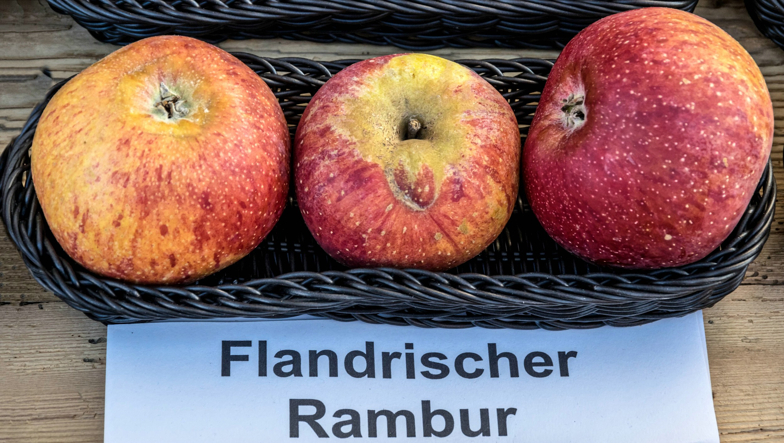 Alte Apfelsorten, von denen es im Badischen noch tragende Bäume gibt. Alle Aufnahmen au dem Oktober 2015